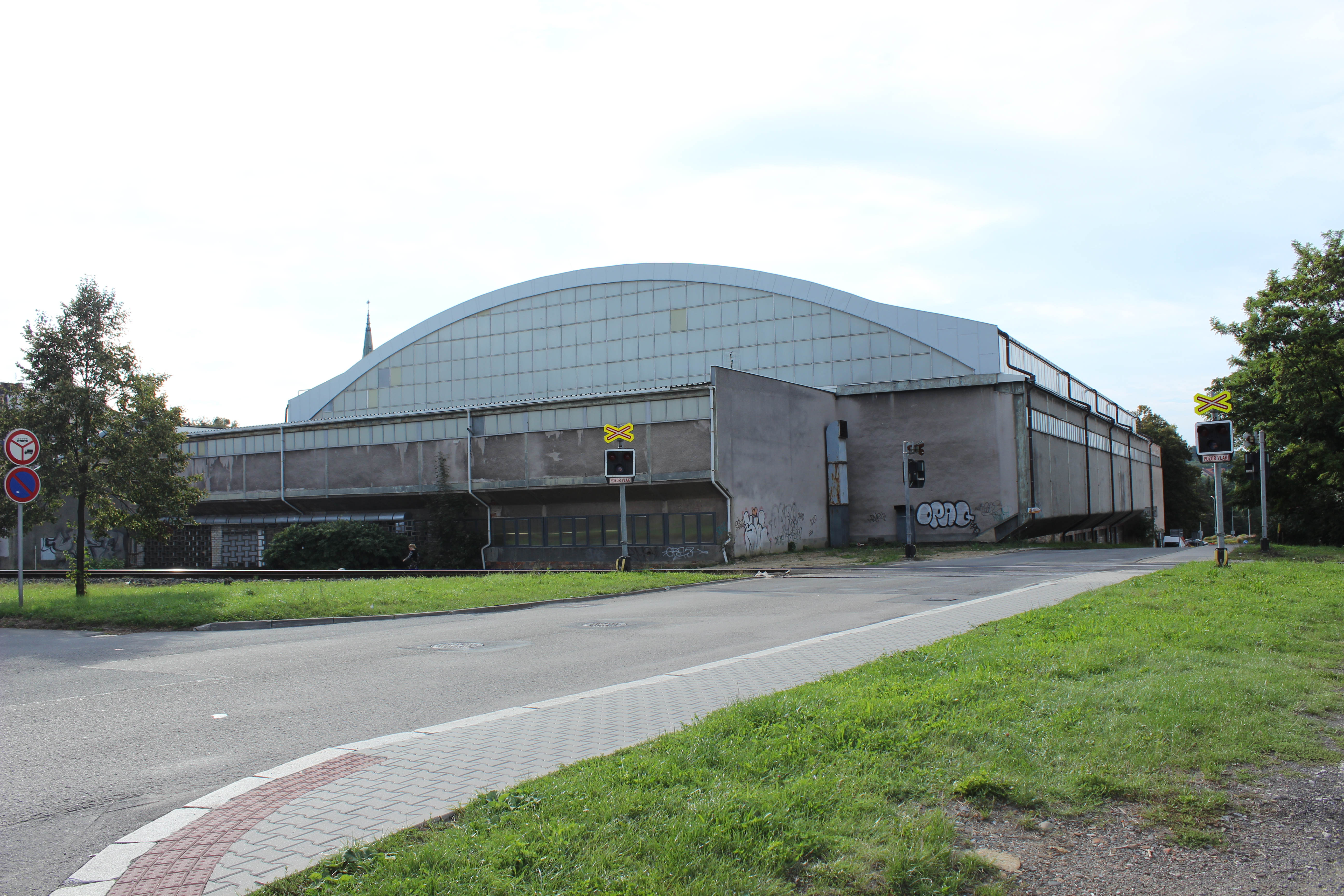 Zimní stadion v Kopřivnici. This image was acquired during the event Wikiměsto Kopřivnice.